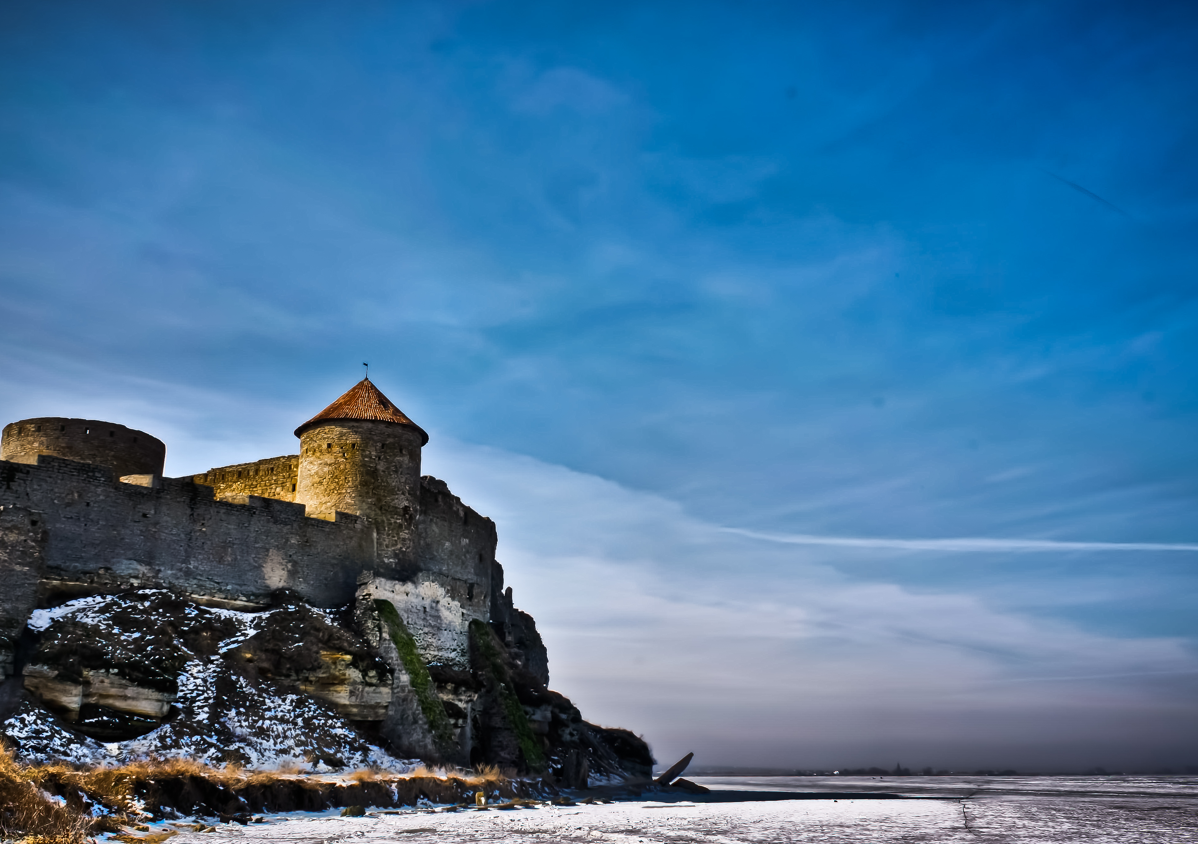 Акерманська фортеця (комплекс), Білгород-Дністровський, фортеця